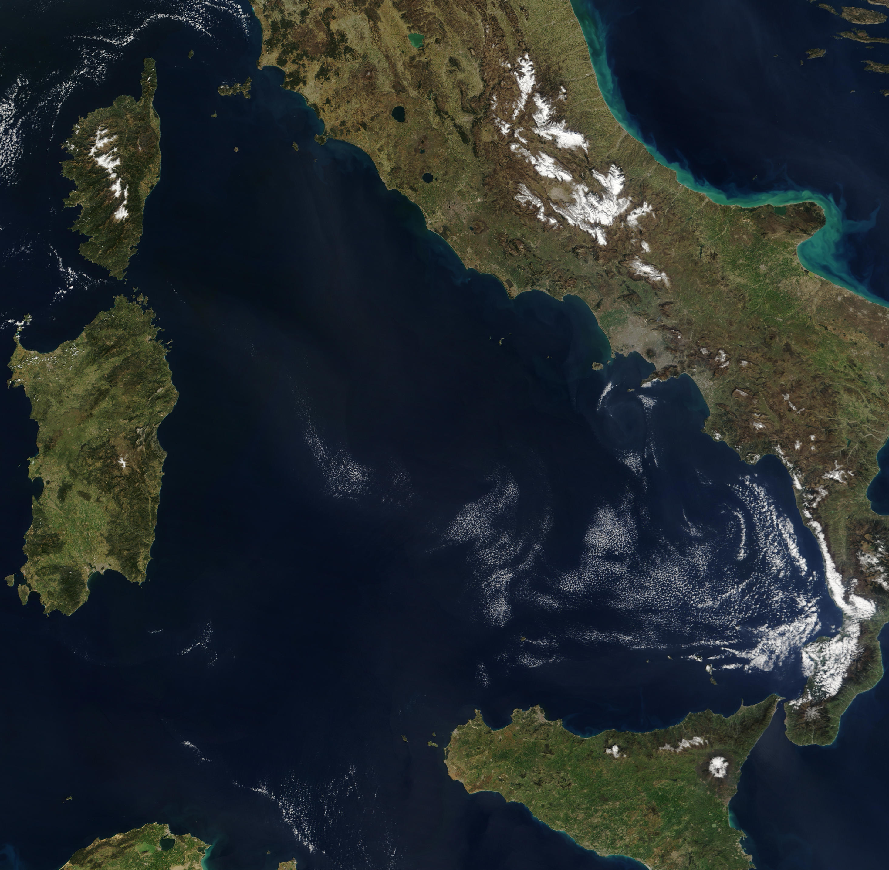 Tirensko morje.